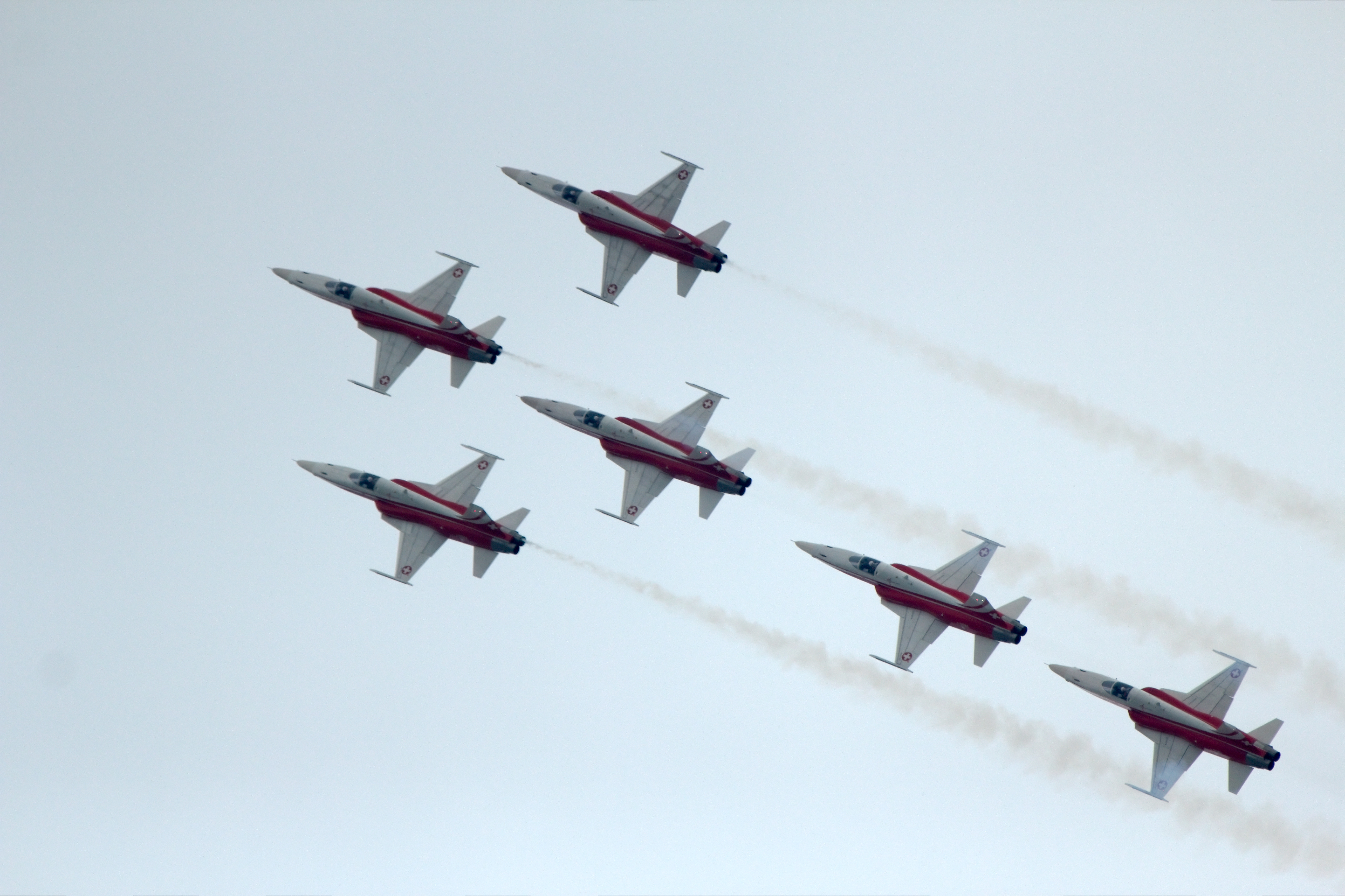 Patrouille Suisse at ILA 2010